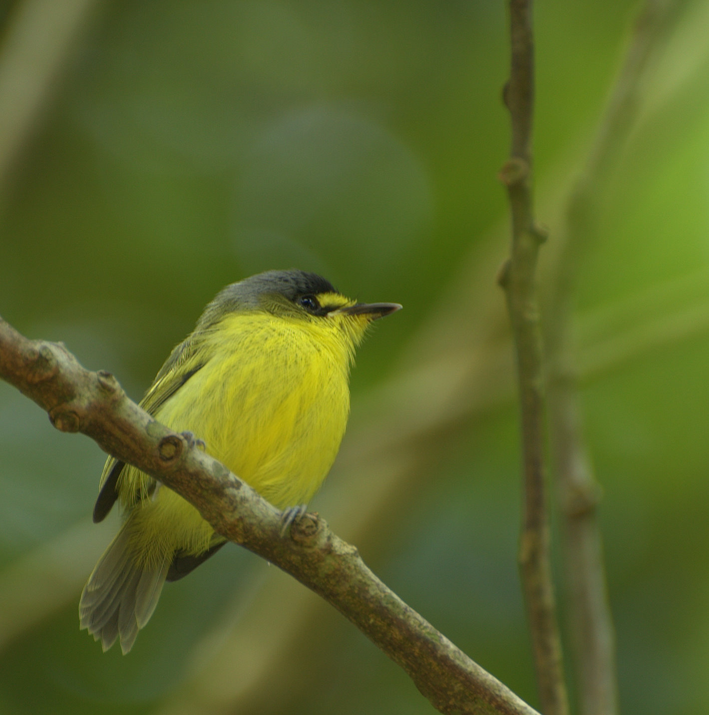 Todirostrum poliocephalum Margem do rio Ribeira de Iguape próximo à cidade de Registro